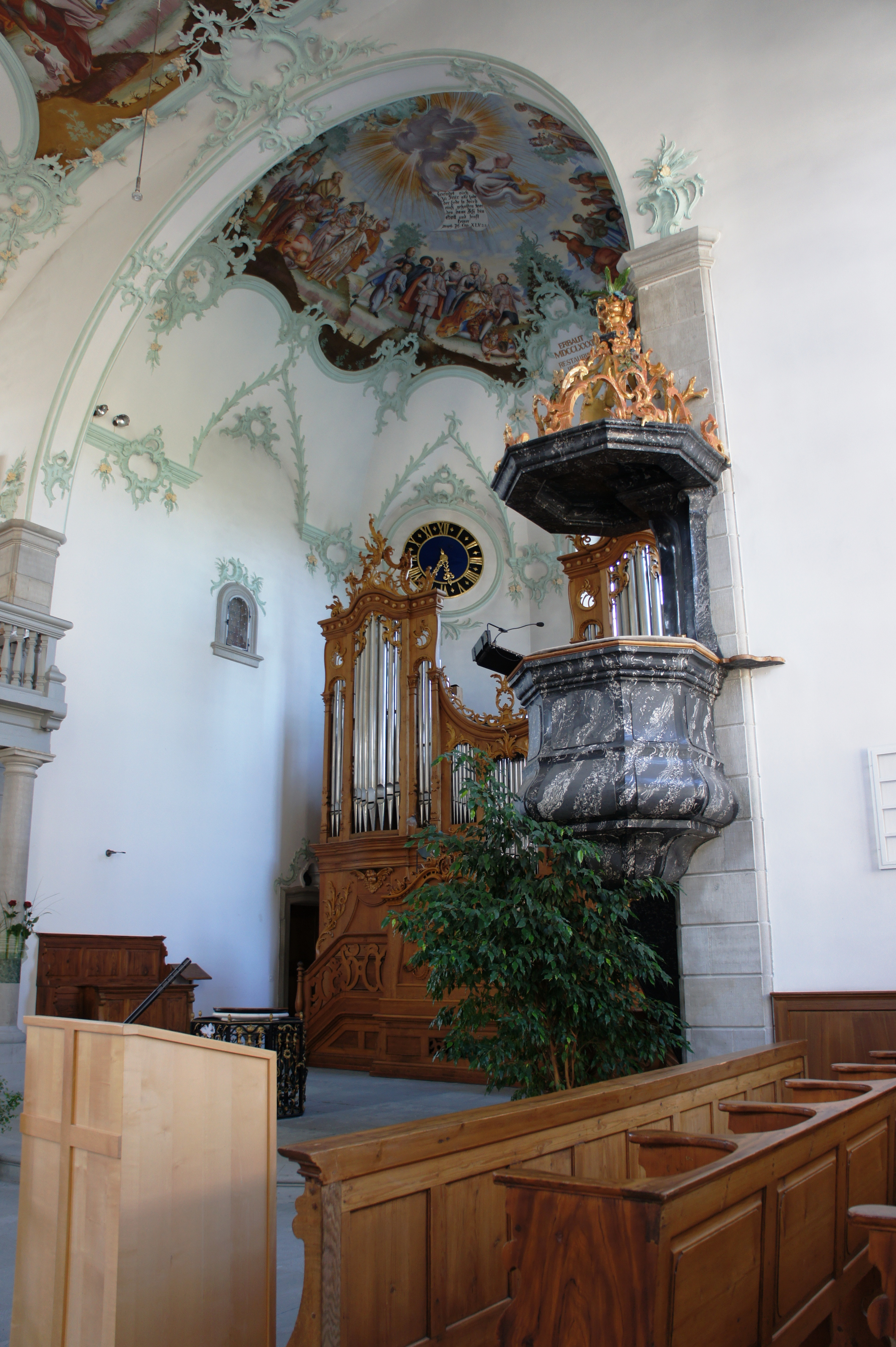 Die Kanzel, dahinter die Chor-Uhr in der ref. Kirche Trogen.